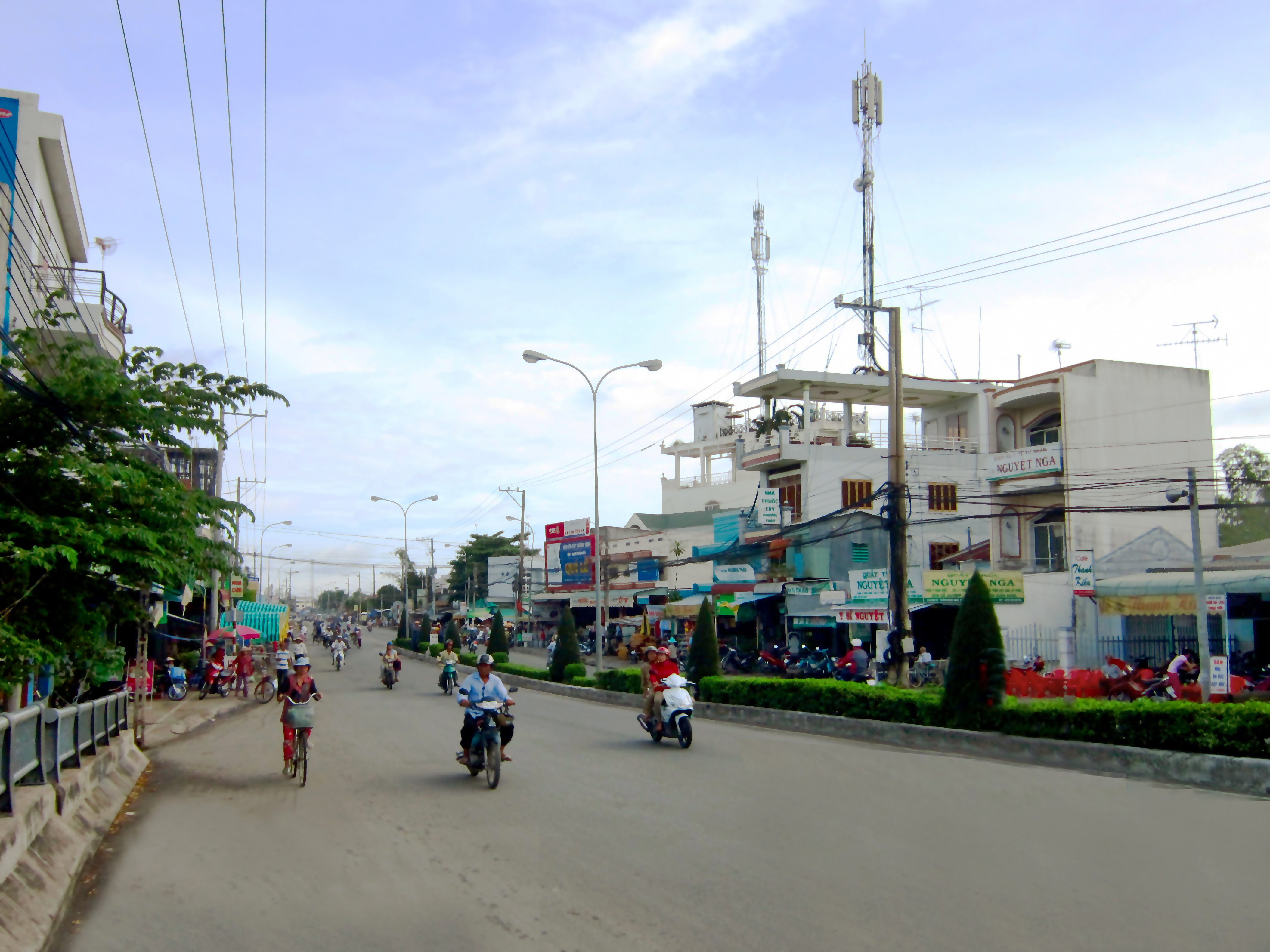 Quốc lộ 91, đoạn đi qua chợ Trà Ôn ở phường Bình Đức (Long Xuyên, An Giang, Việt Nam).